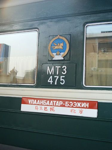 The sign reads: Ulaan Baatar - Beijing.